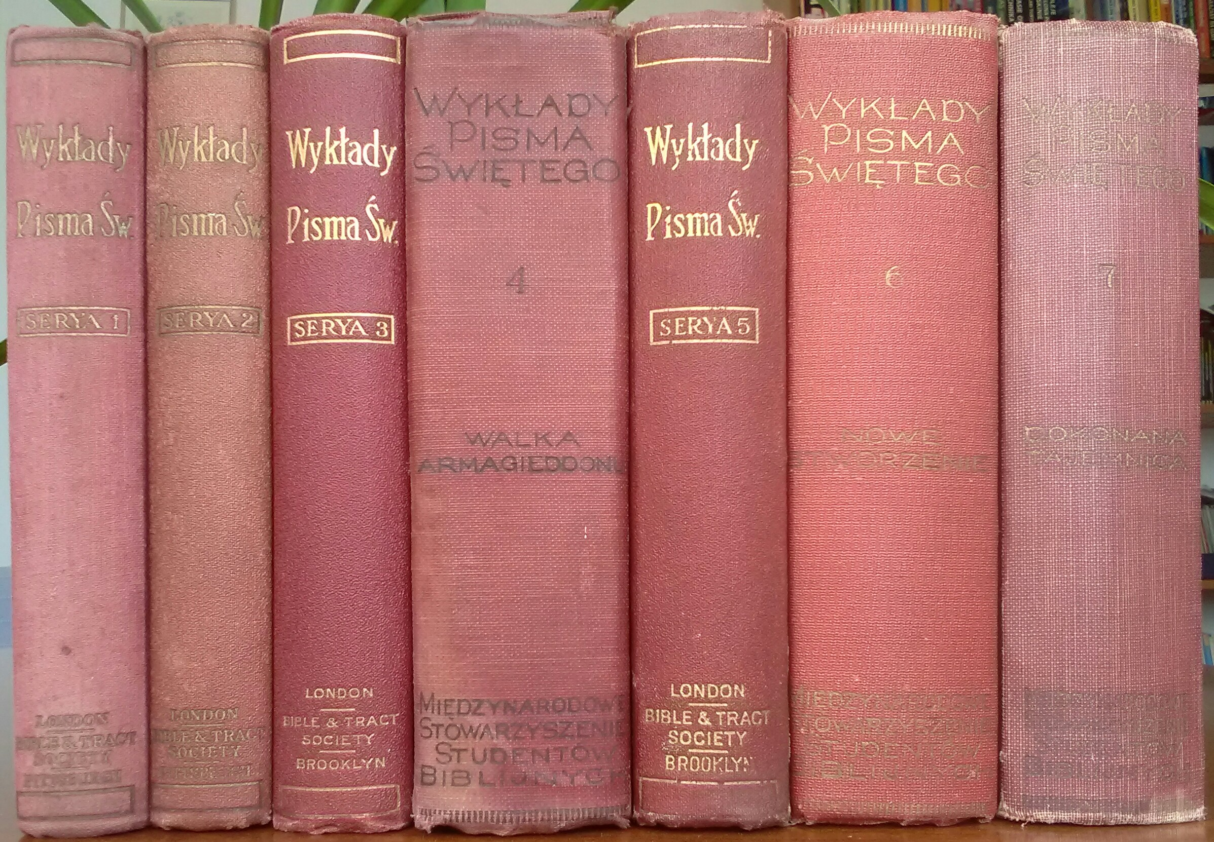 Wykłady Pisma Świętego tomy od 1 do 7.